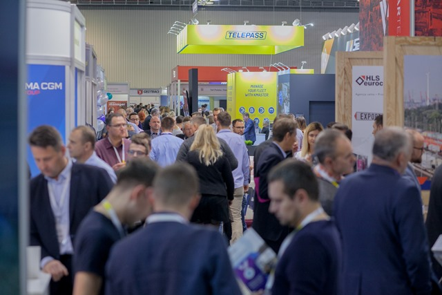 VI edycja TransLogistica Poland